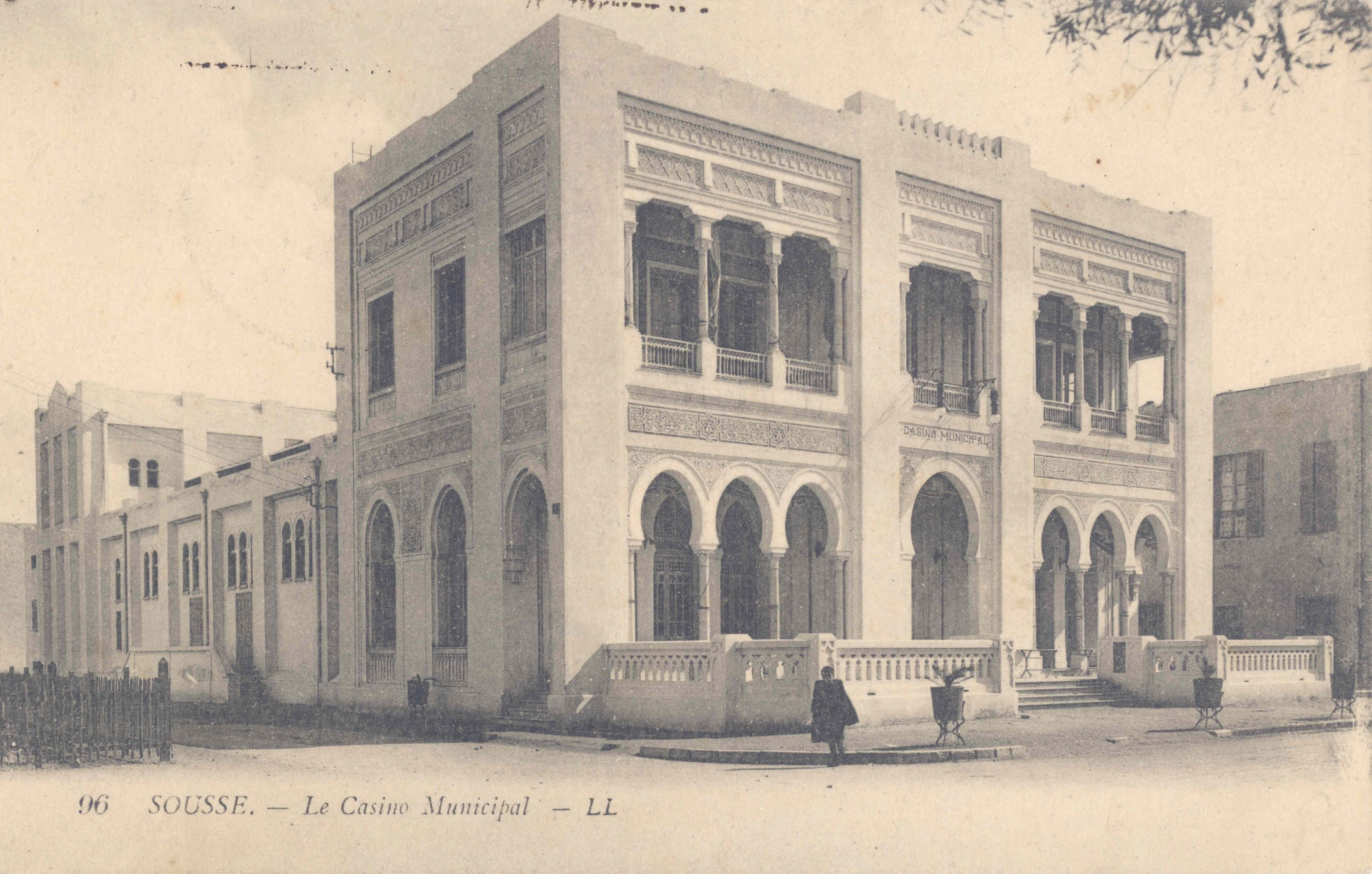 Casino de Sousse vers 1917